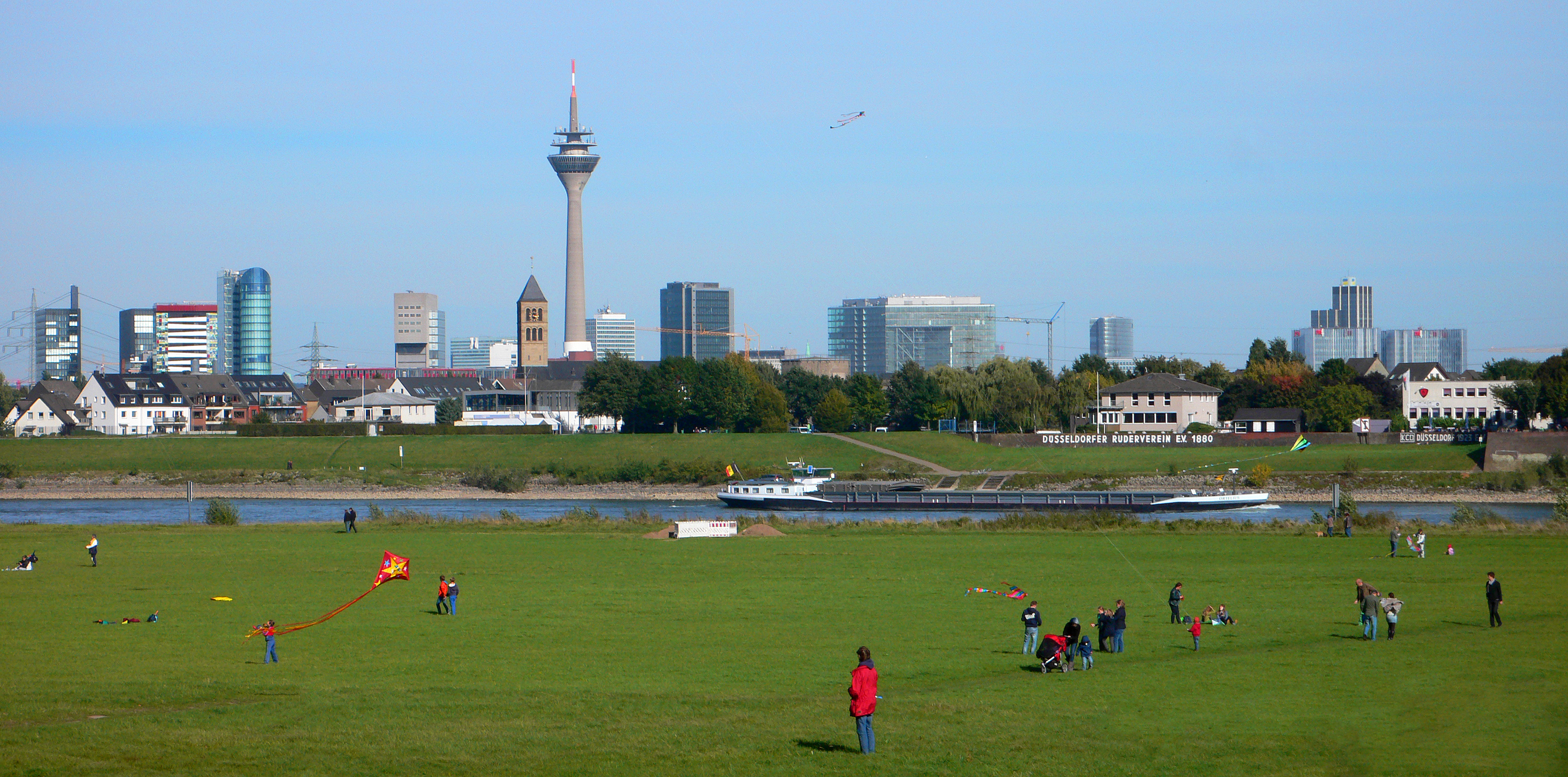 Düsseldorf Panorama - Blick von der gegenüberliegenden Rheinseite